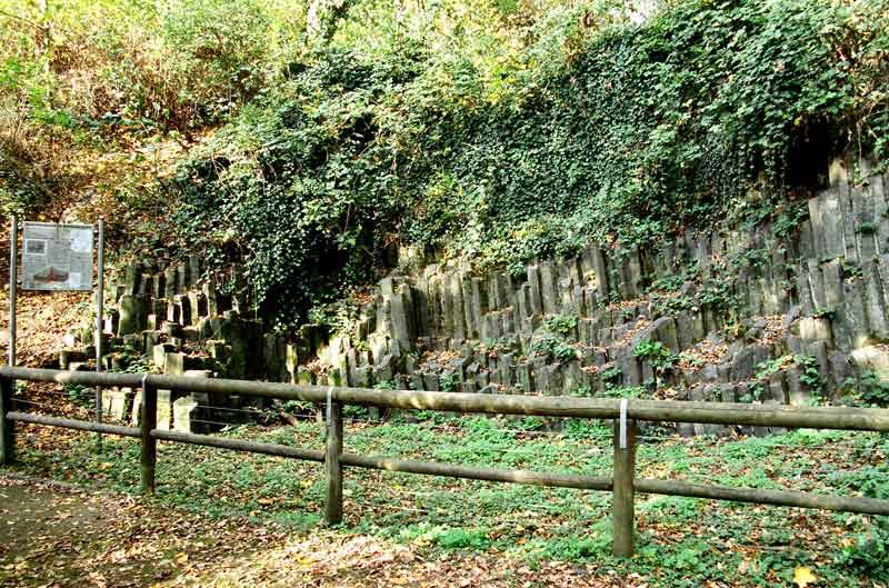 Basaltsteinbruch im Klettenbergpark Köln-Klettenberg